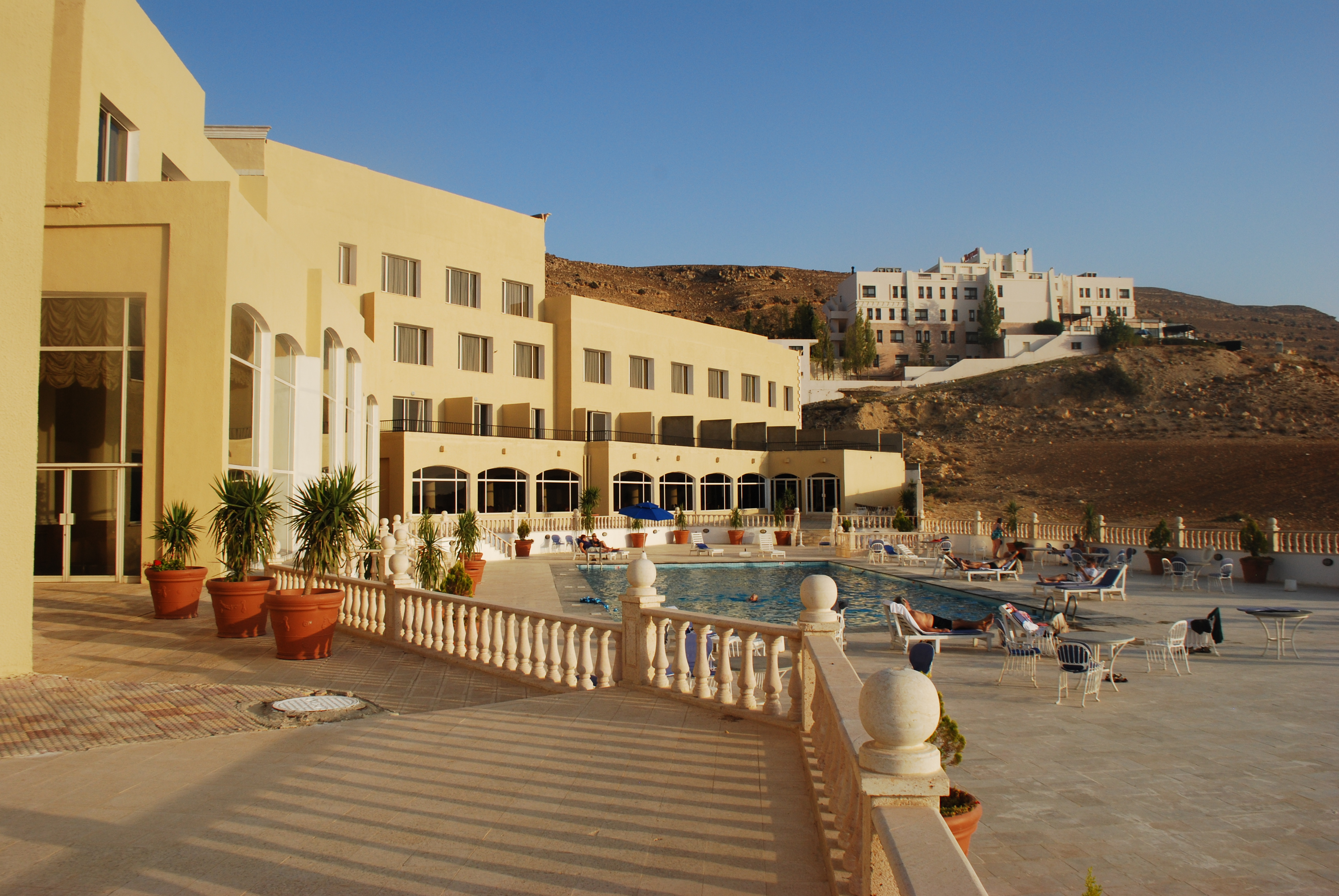 La piscine de l'hôtel Grand View à Wadi Musa.